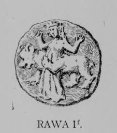 Rawicz If